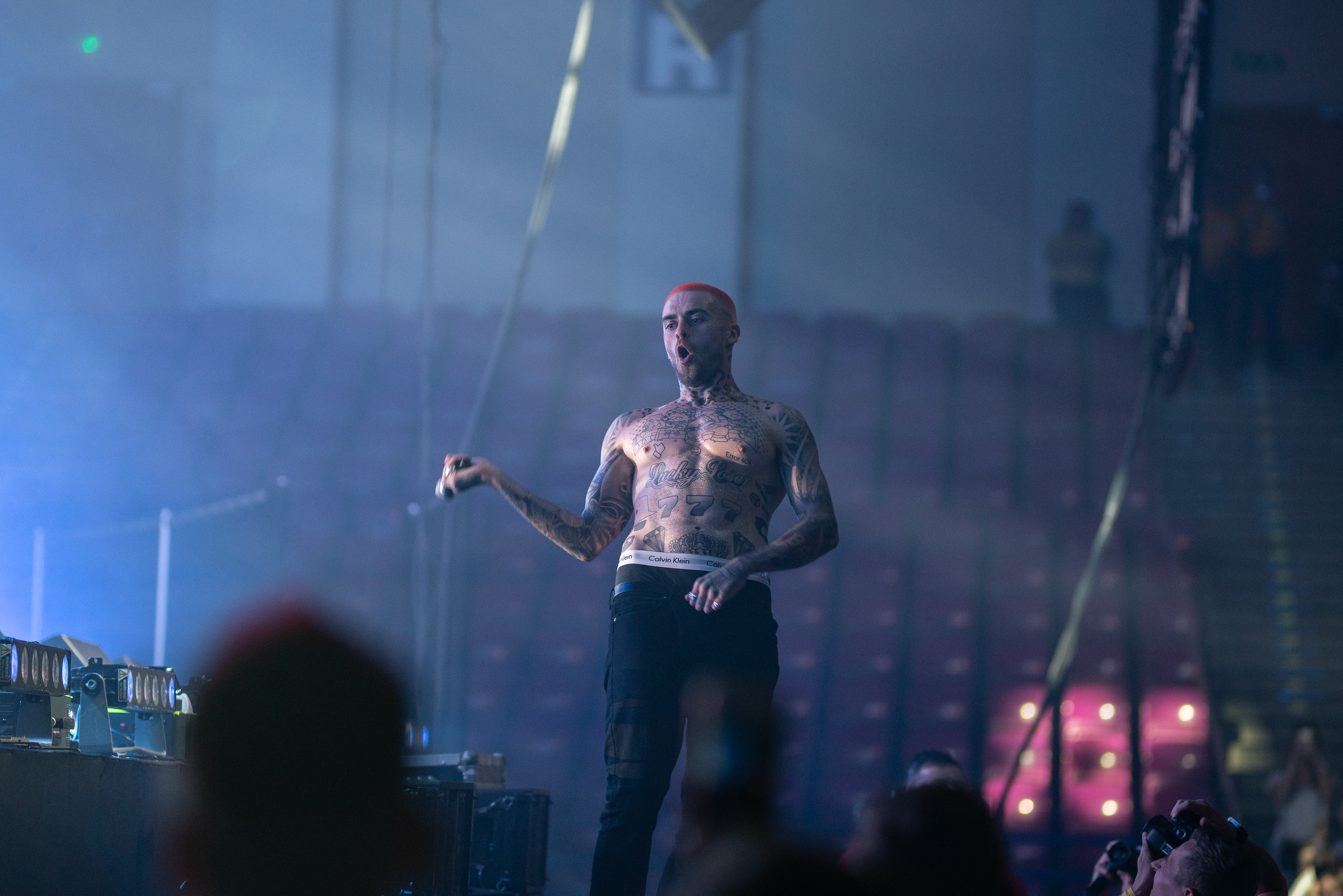 Taconafide podczas koncertu w Warszawie w ramach trasy Ekodiesel Tour promującej debiutancki album Soma 0,5 mg.